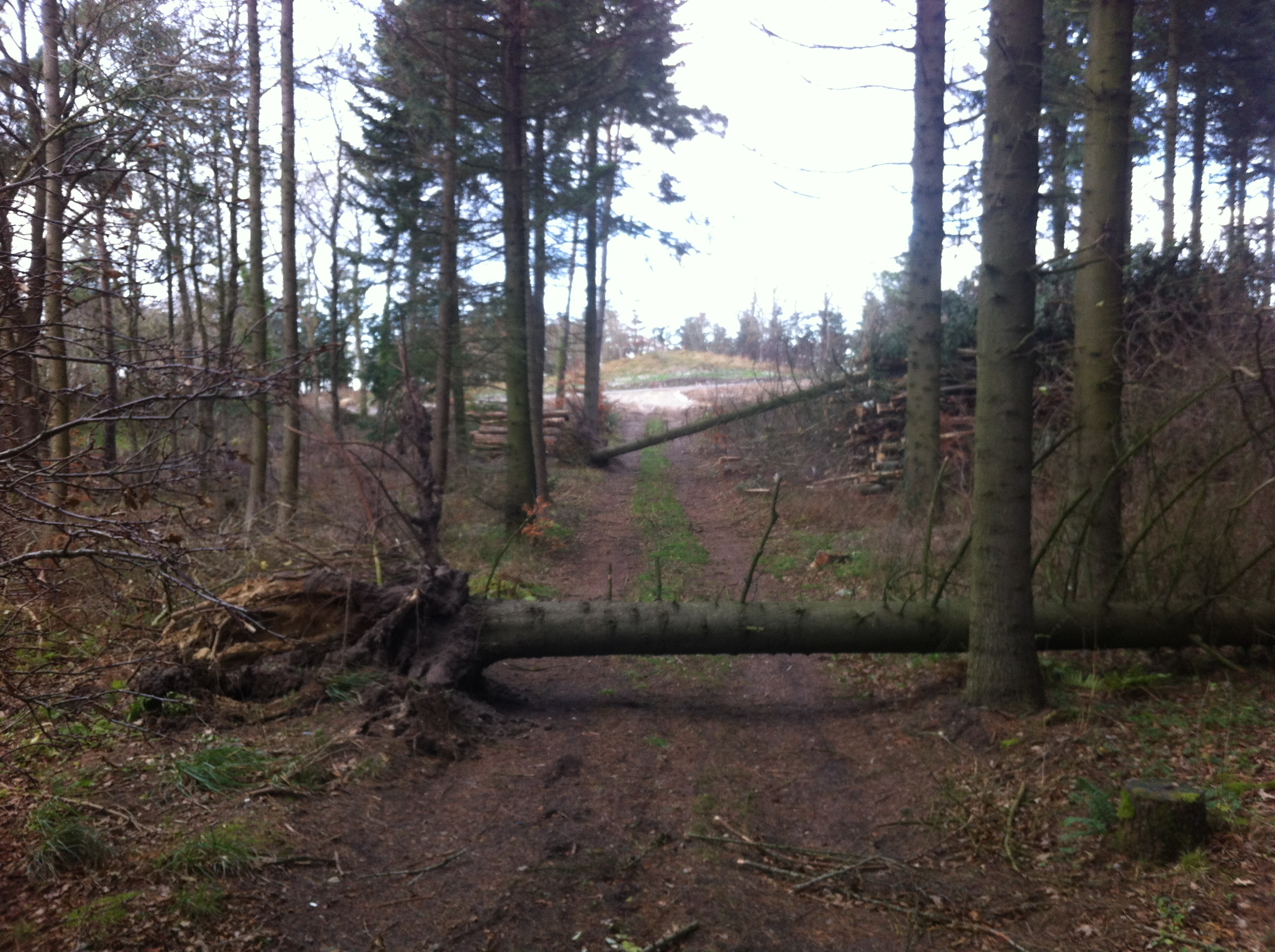 Stormskade i Hadsund. Mange træer væltede.